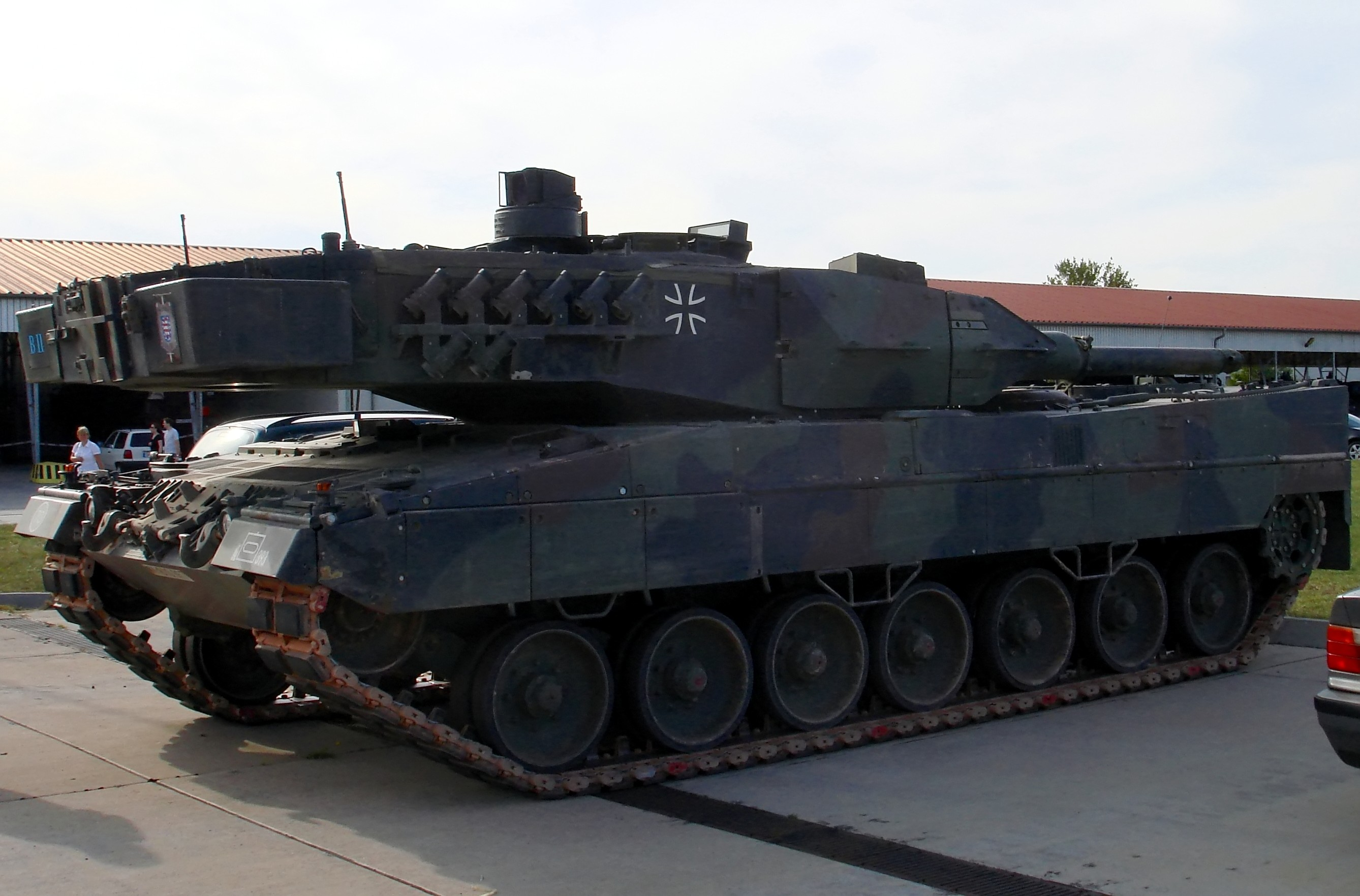 Leopard 2A5 des Panzerbataillon 393 Bad Salzungen. Der Kampfpanzer ist mit der neuen Mehrfachwurfanlage ausgestattet und besitzt die neue schwere Kettenblende (ersten 4 Segmente der Kettenschürze) und die eine verbesserte Ausführung der leichten Kettenblende (letzten Segmente der Schürze) der zweiten Generation. Merkmal dieser Version sind die größeren Aufstiegshilfen.